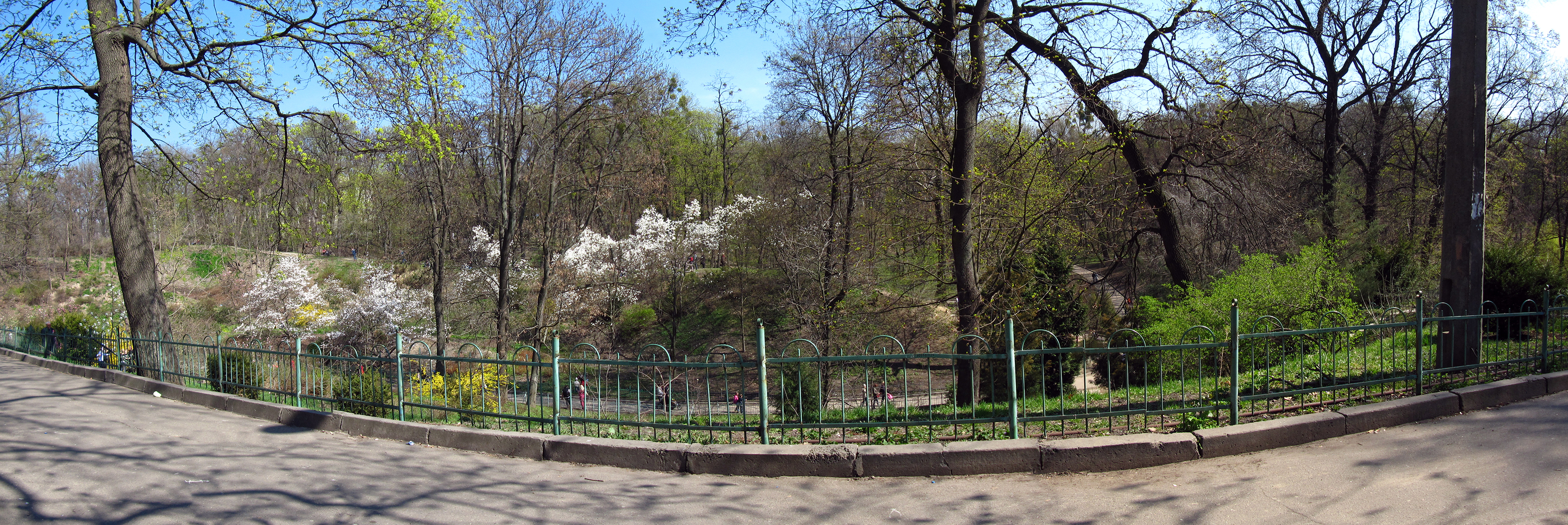 Панорама саду, коли квітнуть магнолії. Верхня дугова аллея